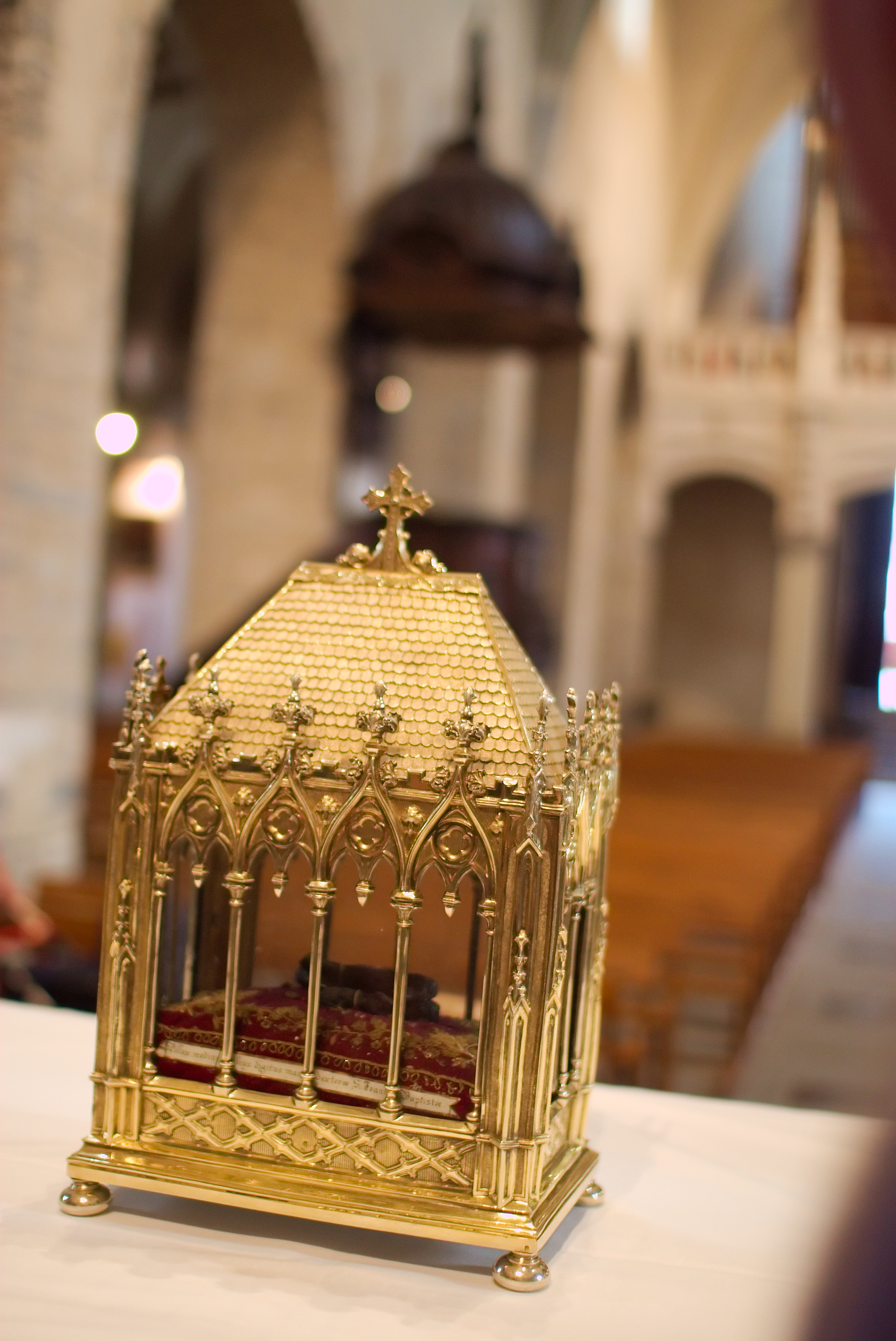 Les reliques de saint Jean-Baptiste exposées à la cathédrale de Saint Jean de Maurienne